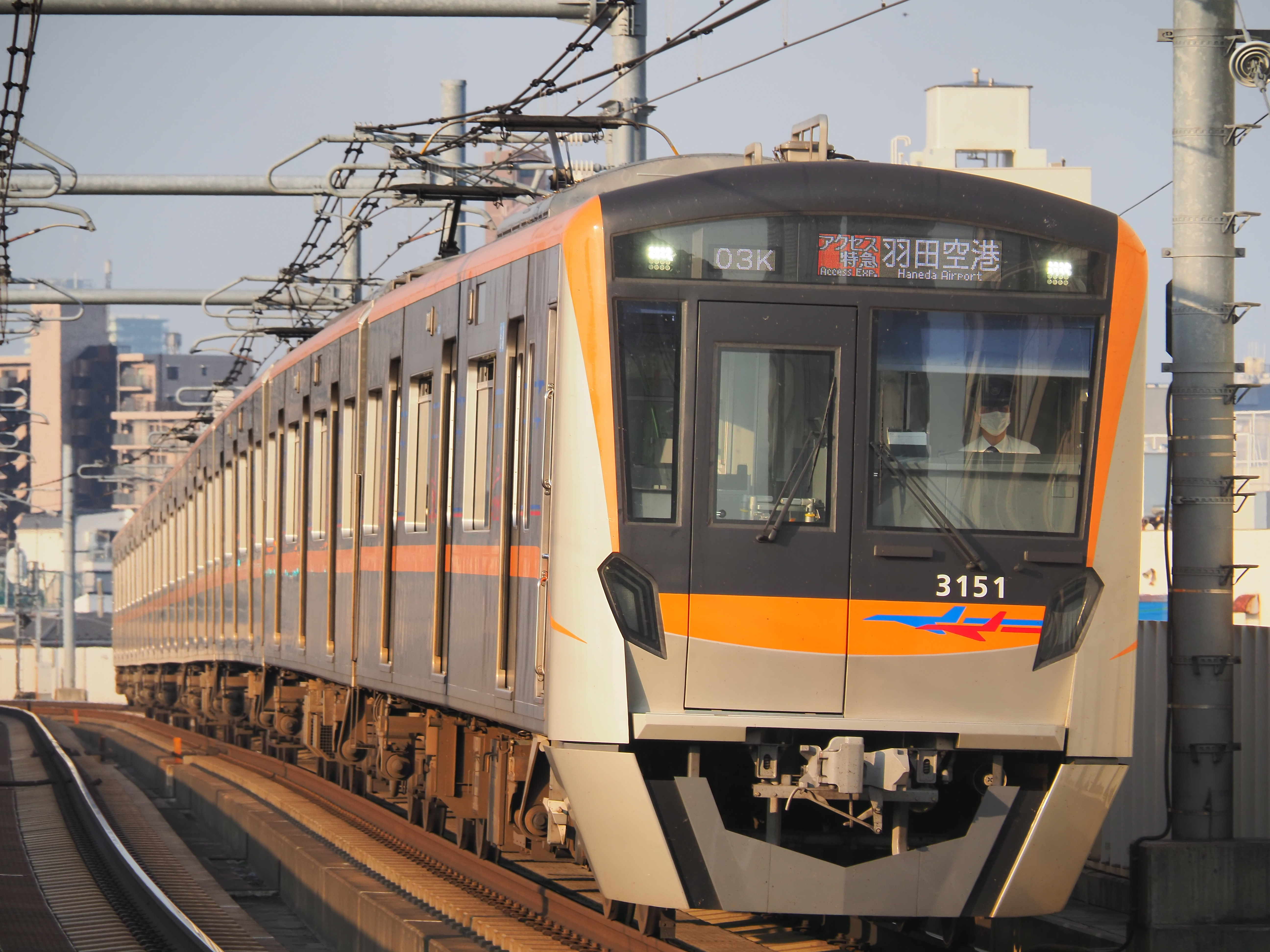 京成3151Fによるアクセス特急羽田空港行き。京成曳舟にて。